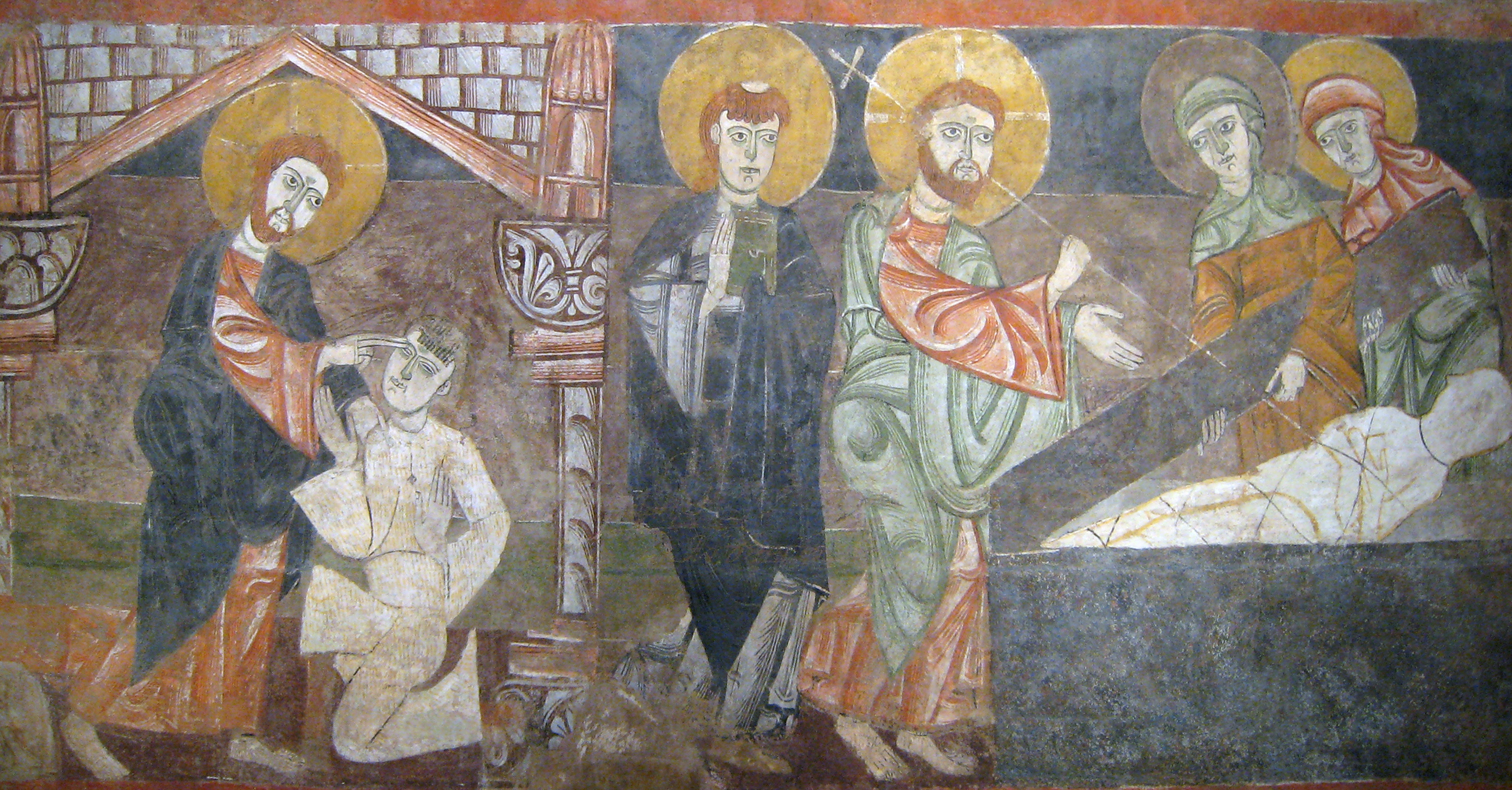 Pintura románica de San Baudelio de Berlnga en el Cloisters Museum de Nueva York, procedente de España.